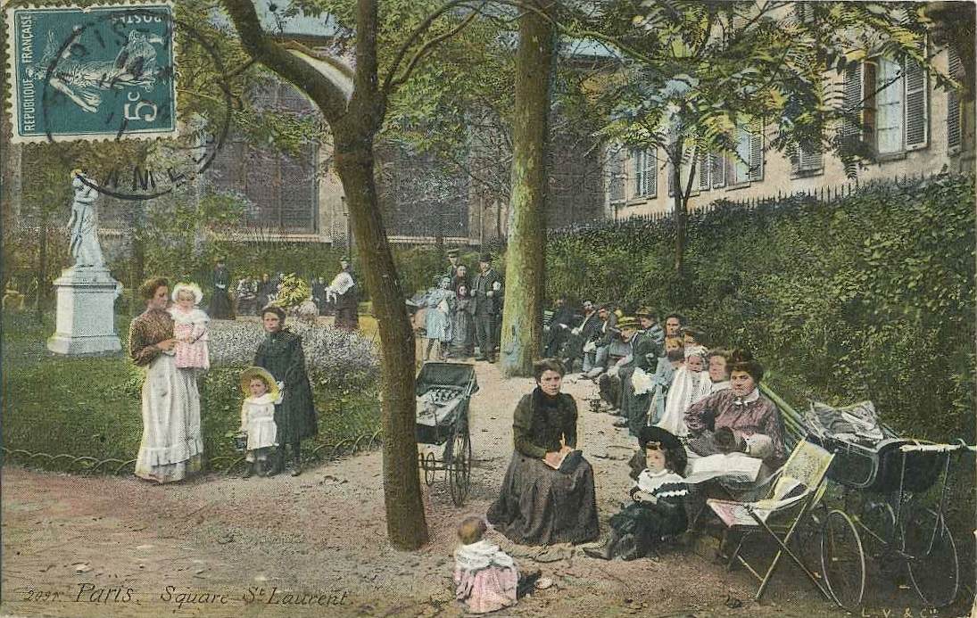 Vue du square Saint-Laurent (Paris, 10e arrond.) - Carte postale coloriée vers 1900/1910. Statue Frère et soeur, pierre (1897), de Louis Albert-Lefeuvre (aujourd'hui enlevée du square).